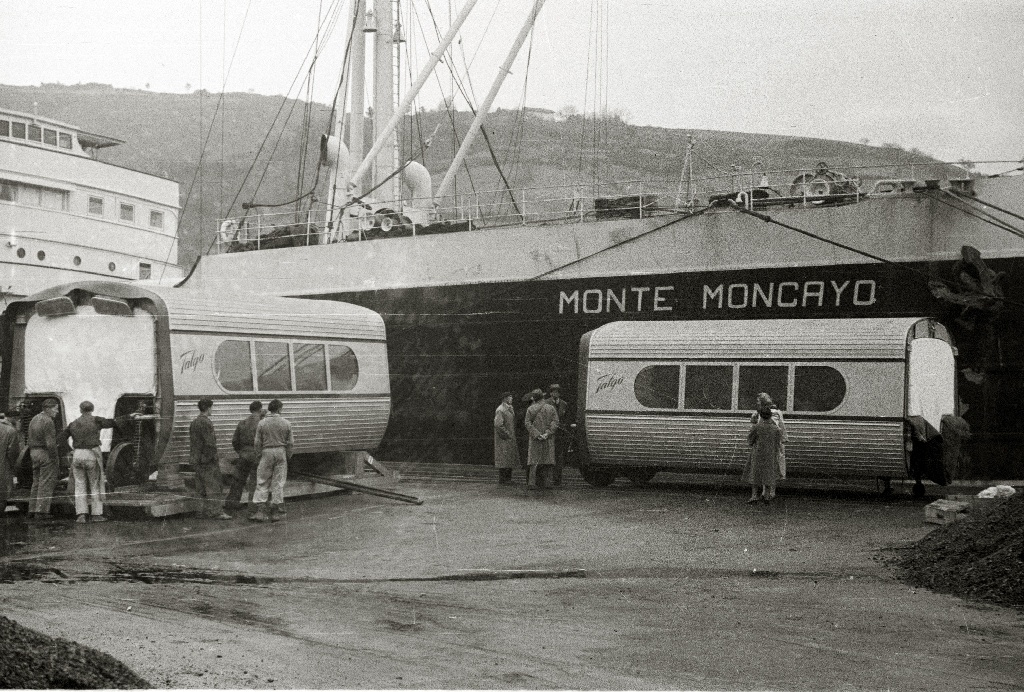 Título original: Llegada de vagónes del 'Talgo' al puerto de Pasaia (12/29) Localización: Pasajes (Guipúzcoa)